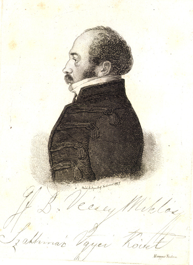 Hajnácskői báró Vécsey Miklós (Kassa, 1789. április 9. – Szenna, 1854. szeptember 26.) császári és királyi kamarás, valóságos belső titkos tanácsos, a Szent István-rend lovagja, főispán.